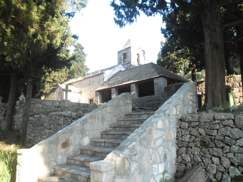 Babino Polje na otoku Mljetu